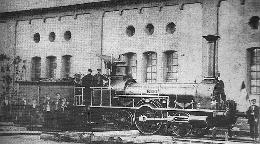 Dampflokomotive Denis in Kaiserslautern.